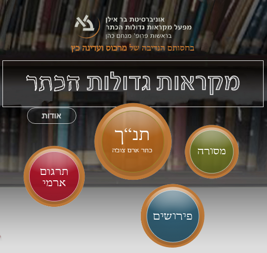 צילום של דף הבית באתר 'מקראות גדולות הכתר'